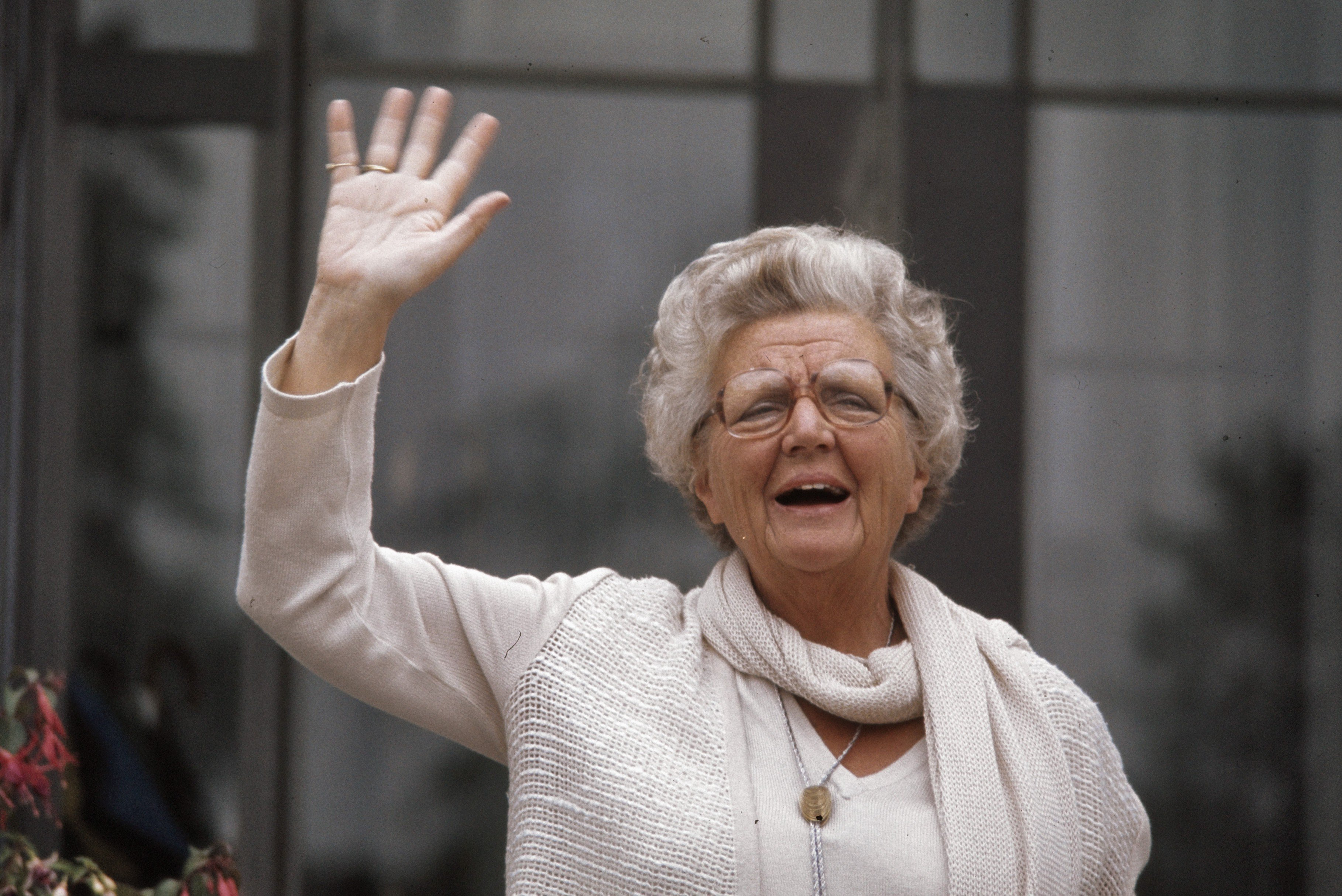 Collectie / Archief : Fotocollectie Anefo Reportage / Serie : [ onbekend ] Beschrijving : Bejaardendefile Soestdijk; koningin Juliana , zwaaiend (close) Datum : juni 1978 Trefwoorden : Defiles, bejaarden, koninginnen Persoonsnaam : Juliana (koningin Nederland), Juliana, koningin Fotograaf : Verhoeff, Bert / Anefo Auteursrechthebbende : Nationaal Archief Materiaalsoort : Dia (kleur) Nummer archiefinventaris : bekijk toegang 2.24.01.06 Bestanddeelnummer : 253-8002